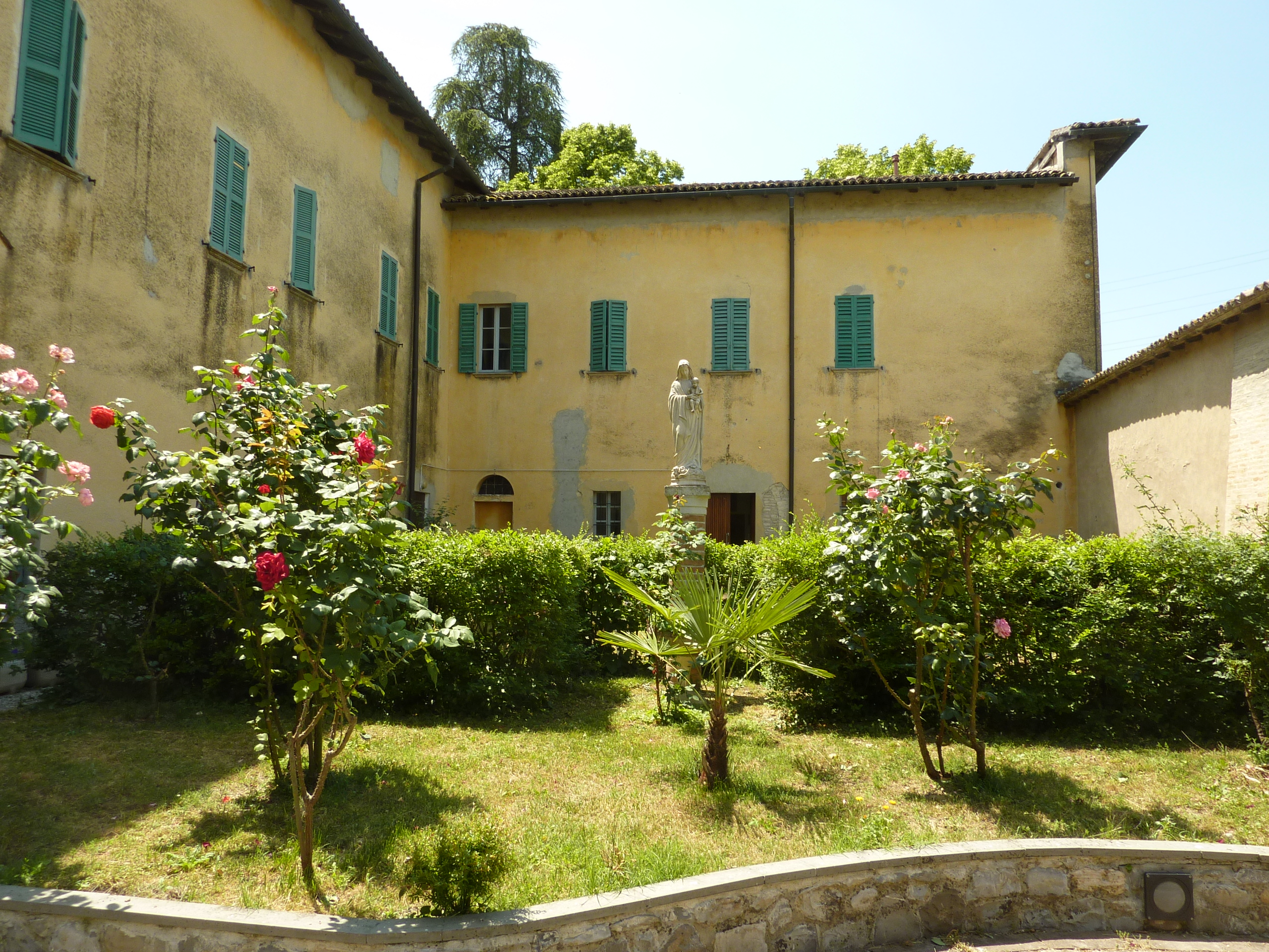 Il giardino della Badia di Torrechiara.